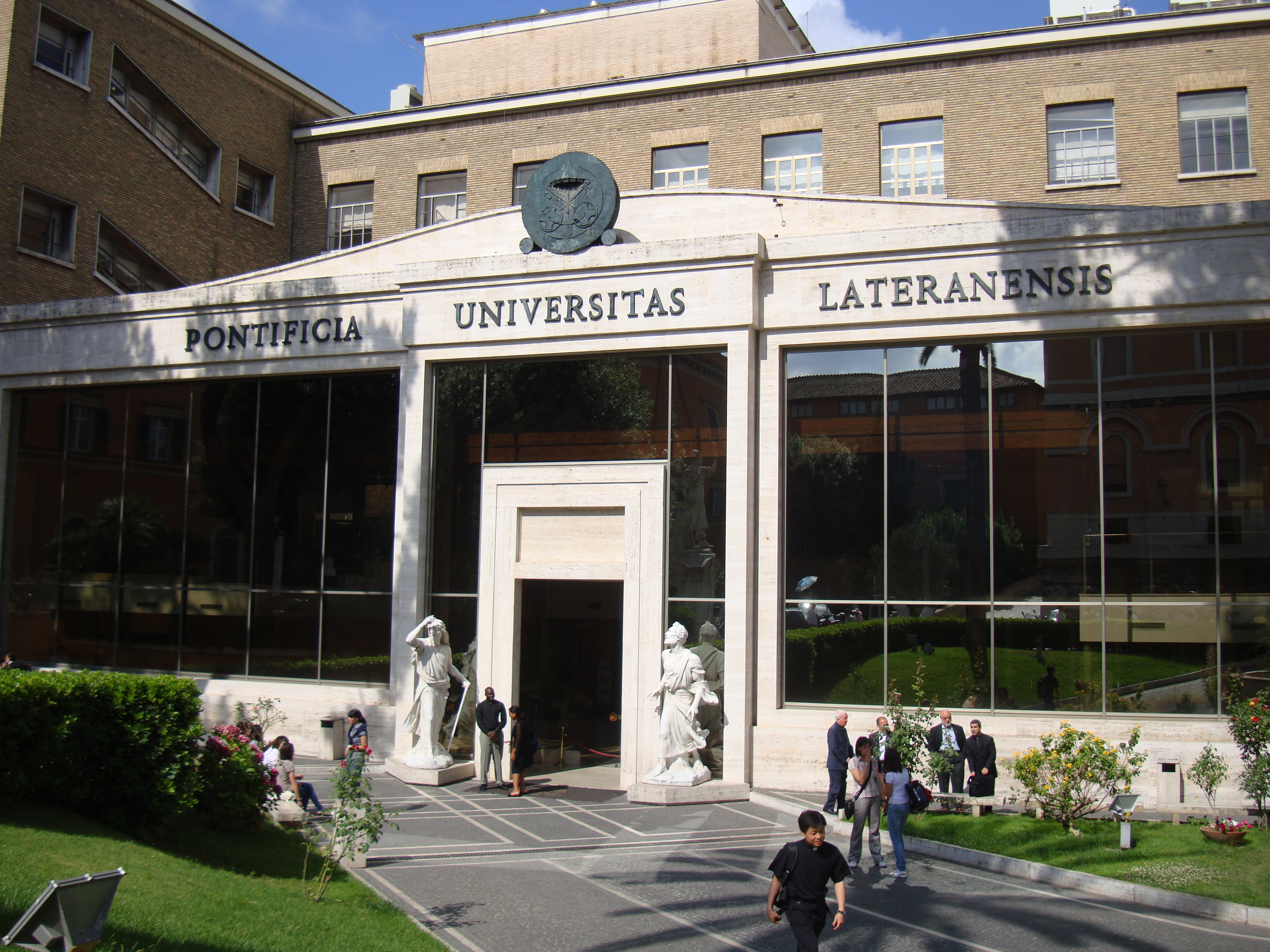 Edifici principal de la Universitat Pontifícia Lateranense.